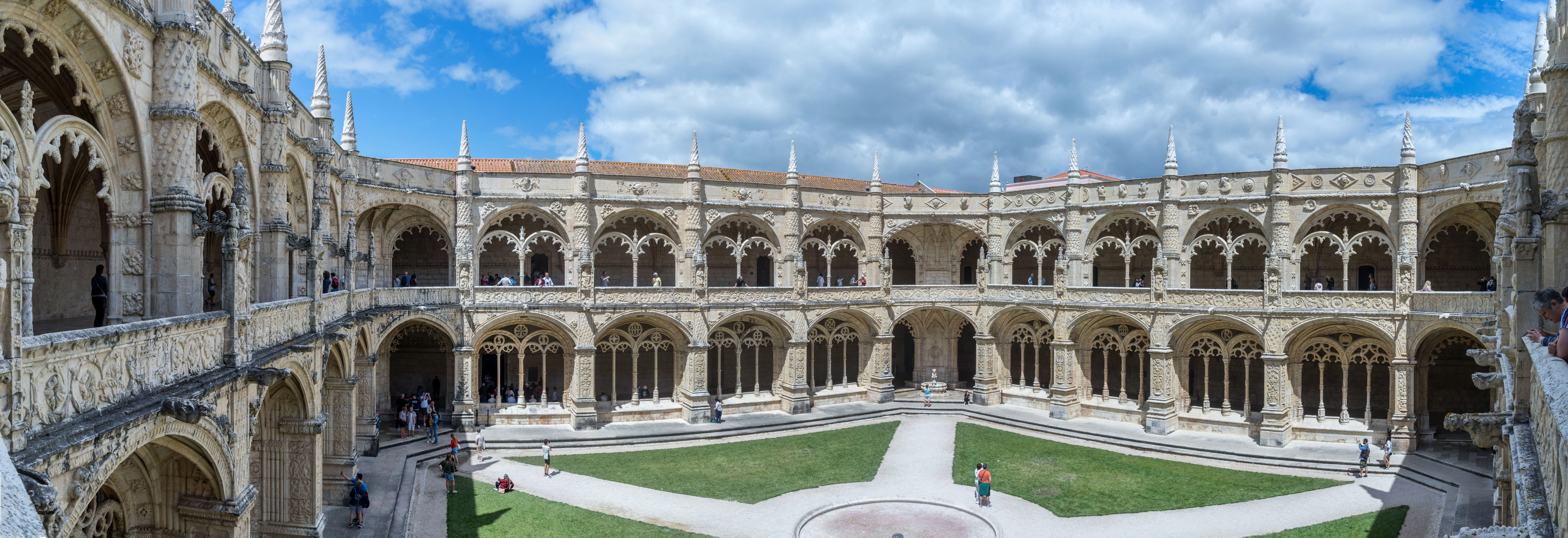 Lisbonne - Hiérominites - Cloitre - Panorama